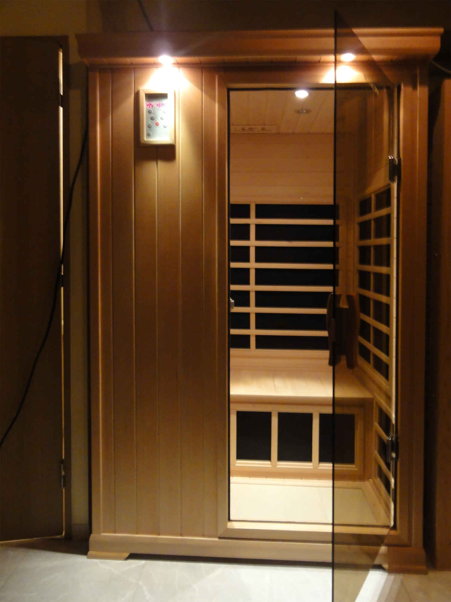 Sauna.Kobe Medi-care 神戸メディケアショールーム